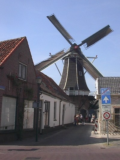 Windmolen 'de Fortuin' in Hattem